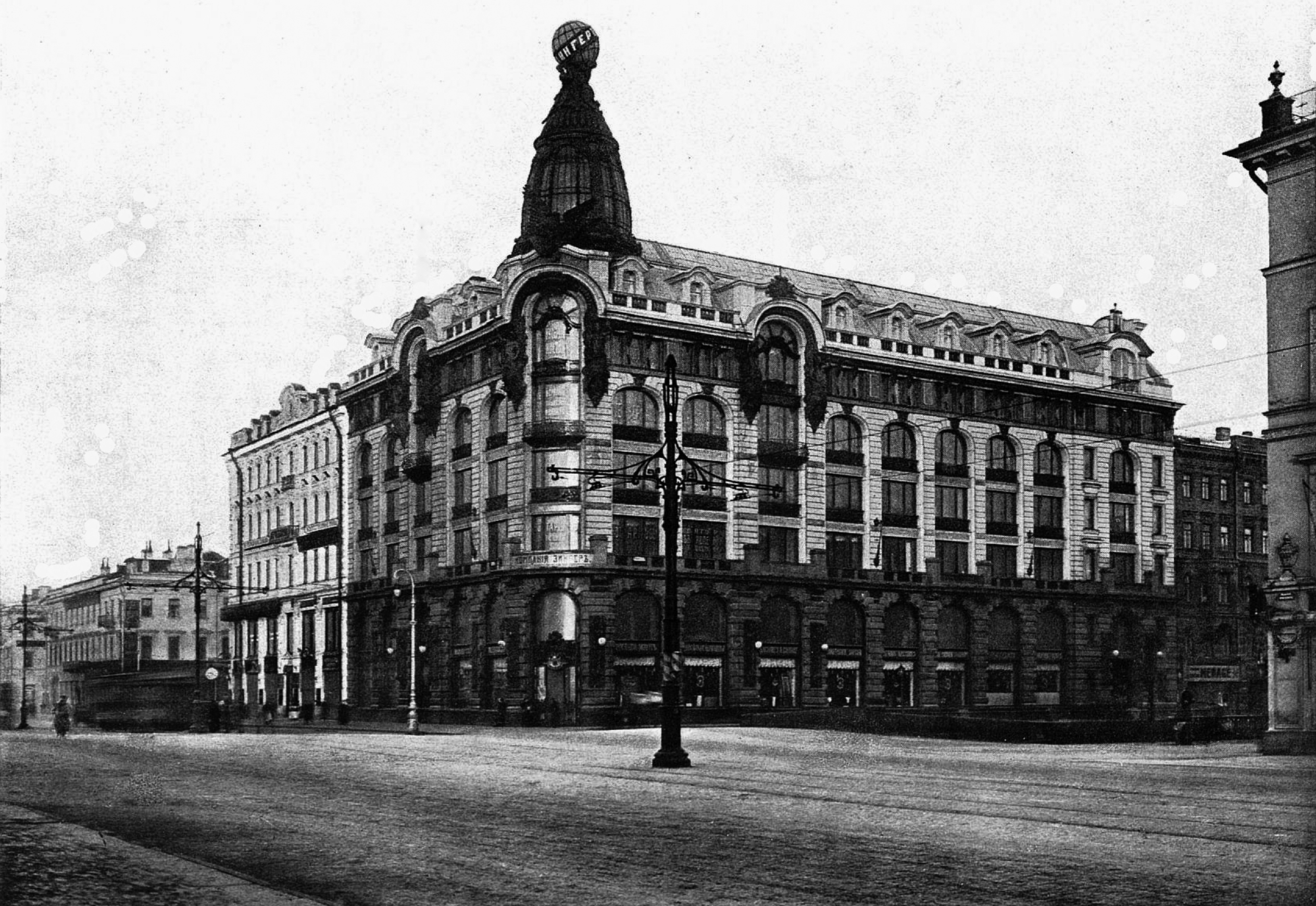 Невский, 28, 1904-1914